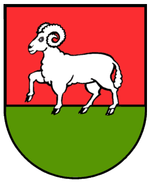 Wappen der ehemaligen Gemeinde Adelsreute, Baden-Württemberg (heute Teil der Ortschaft Taldorf der Stadt Ravensburg)